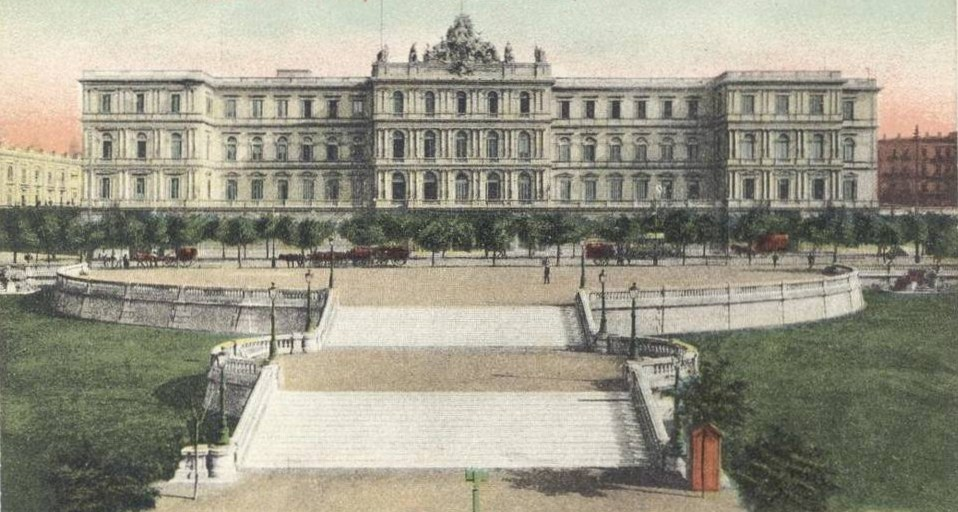 Vista del Parque Colón en Buenos Aires, inaugurado en 1904 en el terreno antes ocupado por la Aduana de Taylor. Se ve el espacio central del parque vacío antes de la donación del Monumento a Colón, inaugurado en 1921. Detrás, se destaca la fachada este de la Casa Rosada, sede del Gobierno Nacional desde 1862. Además, la Avenida Paseo Colón pasando entre el edificio y el parque, en el espacio hoy ocupado por el Museo del Bicentenario.